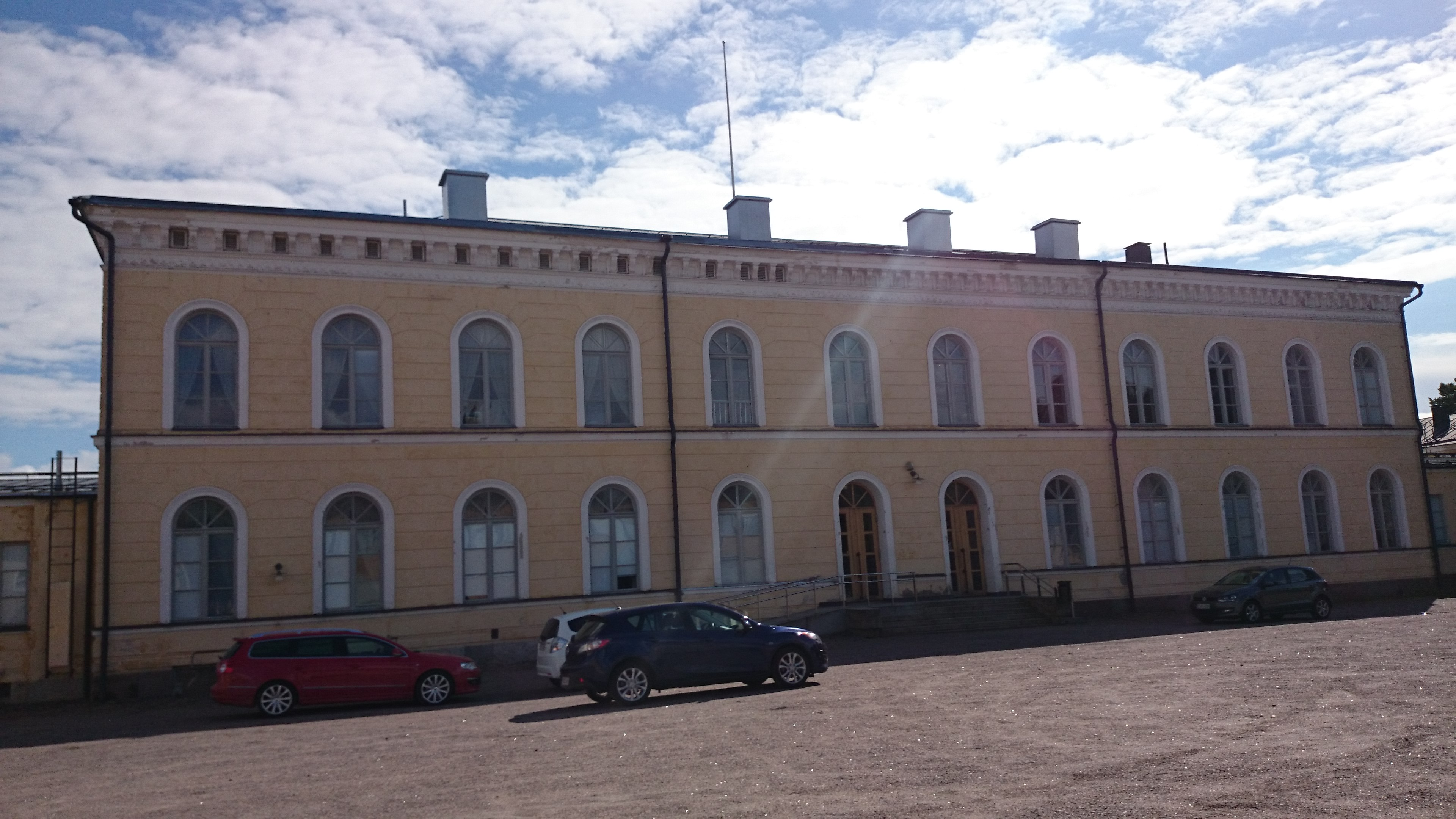 Borgå gymnasium